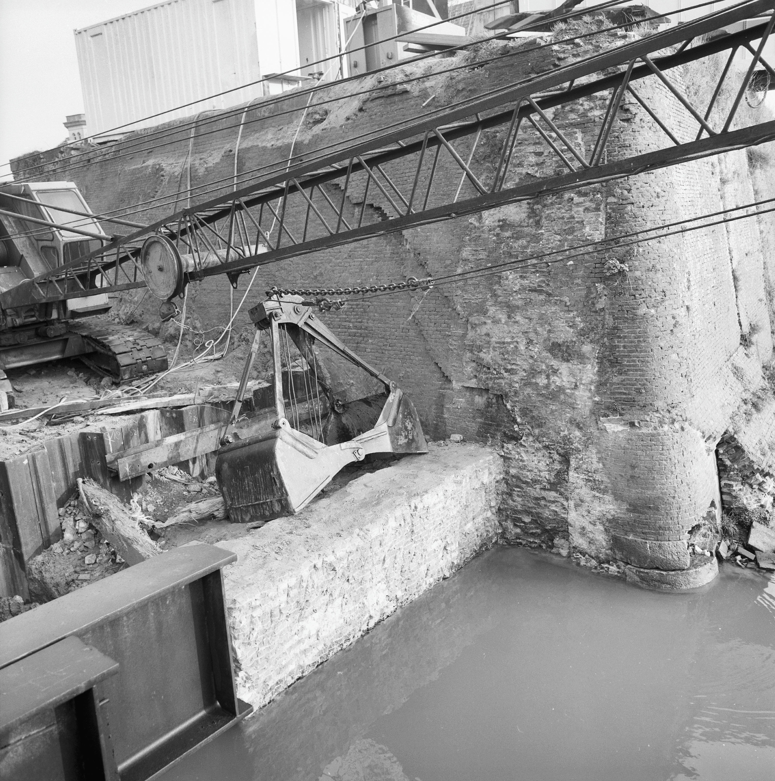 Oude Merwedesluis: Oude Merwedesluis bij graafwerkzaamheden, Oude Haven-mond noord